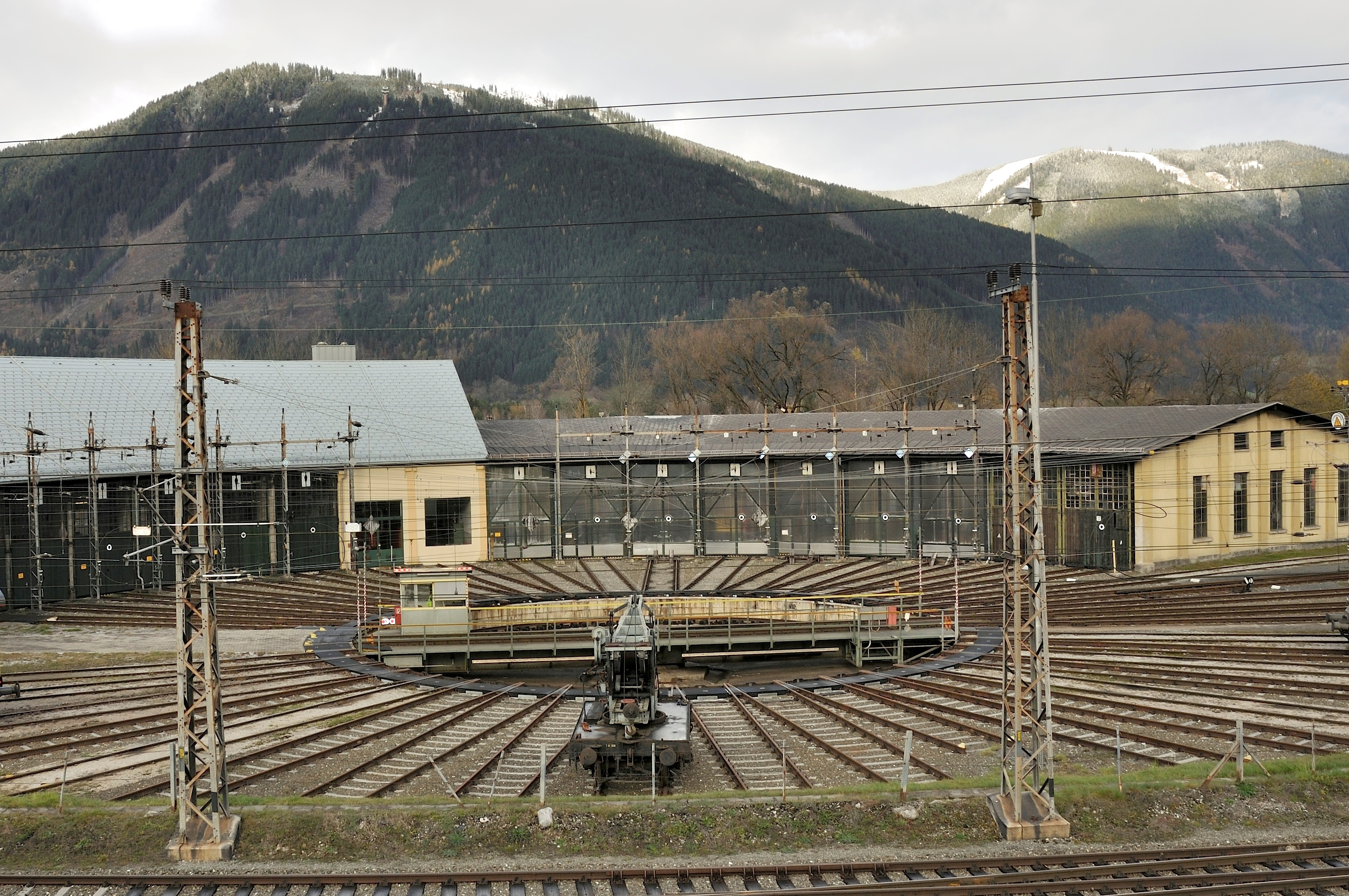 Rundlokschuppen mit Drehscheibe des Bahnhofes Selzthal